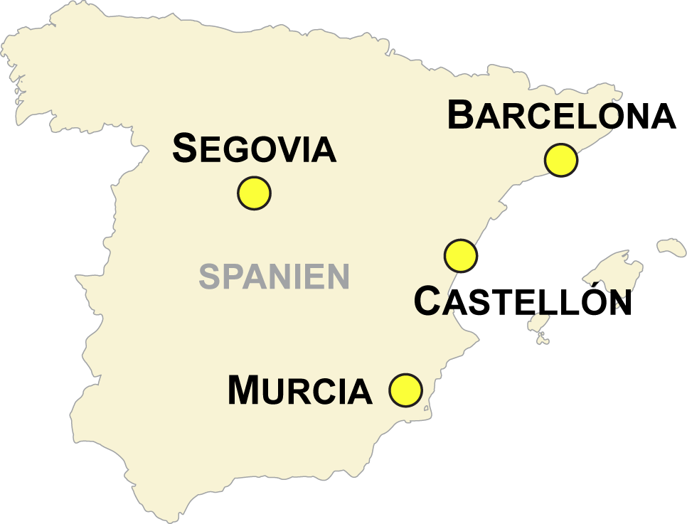 Austragungsorte der Futsal-WM 1996 in Spanien This map is the result from a map request to the Kartenwünsche in the Kartenwerkstatt. You can make a request for a new map to us as well.